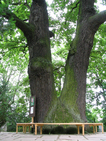 Památný Körnerův dub v Plzni.